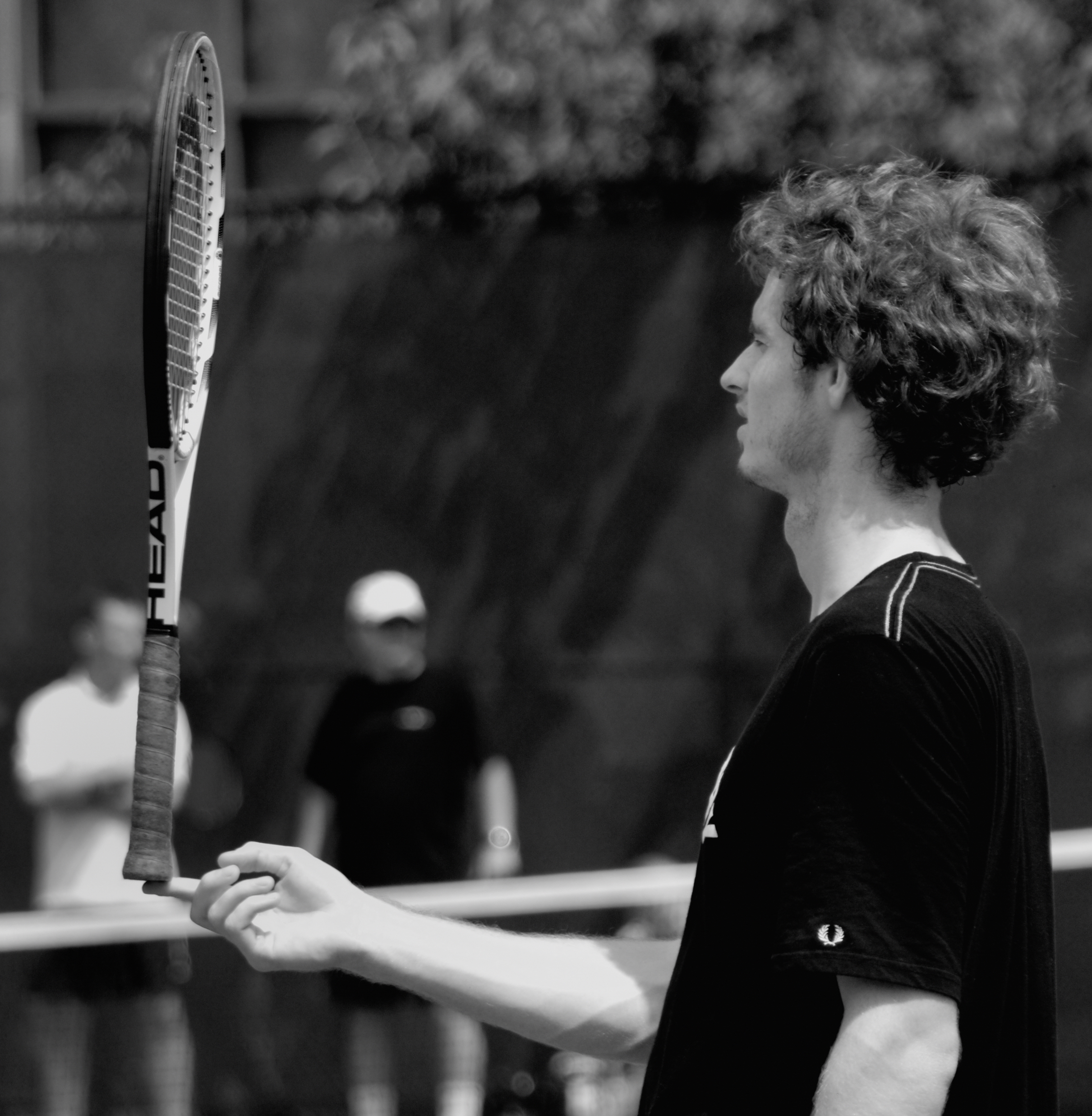 Andy in balance